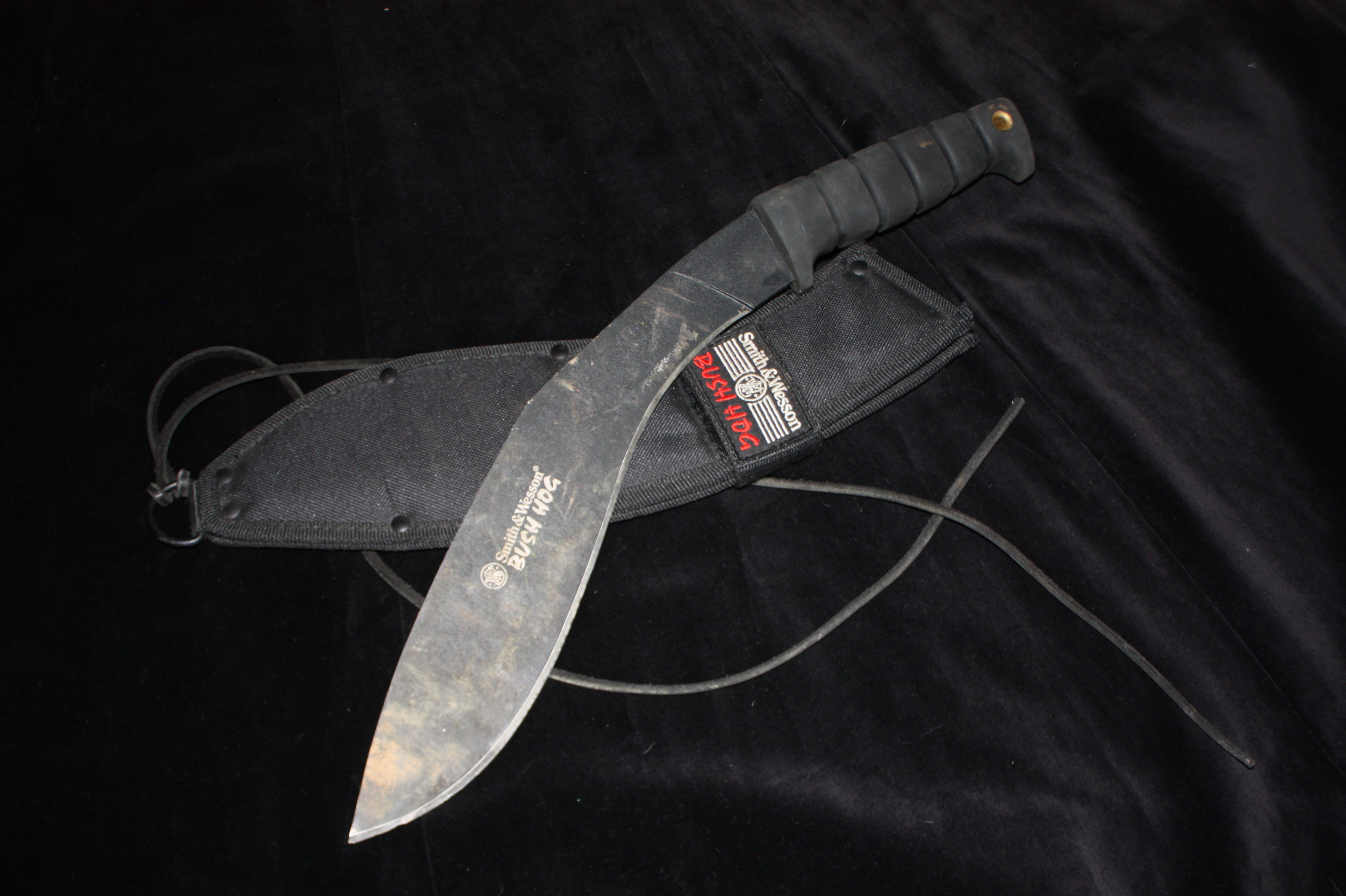 Smith & Wesson Bush Hog kukri-style